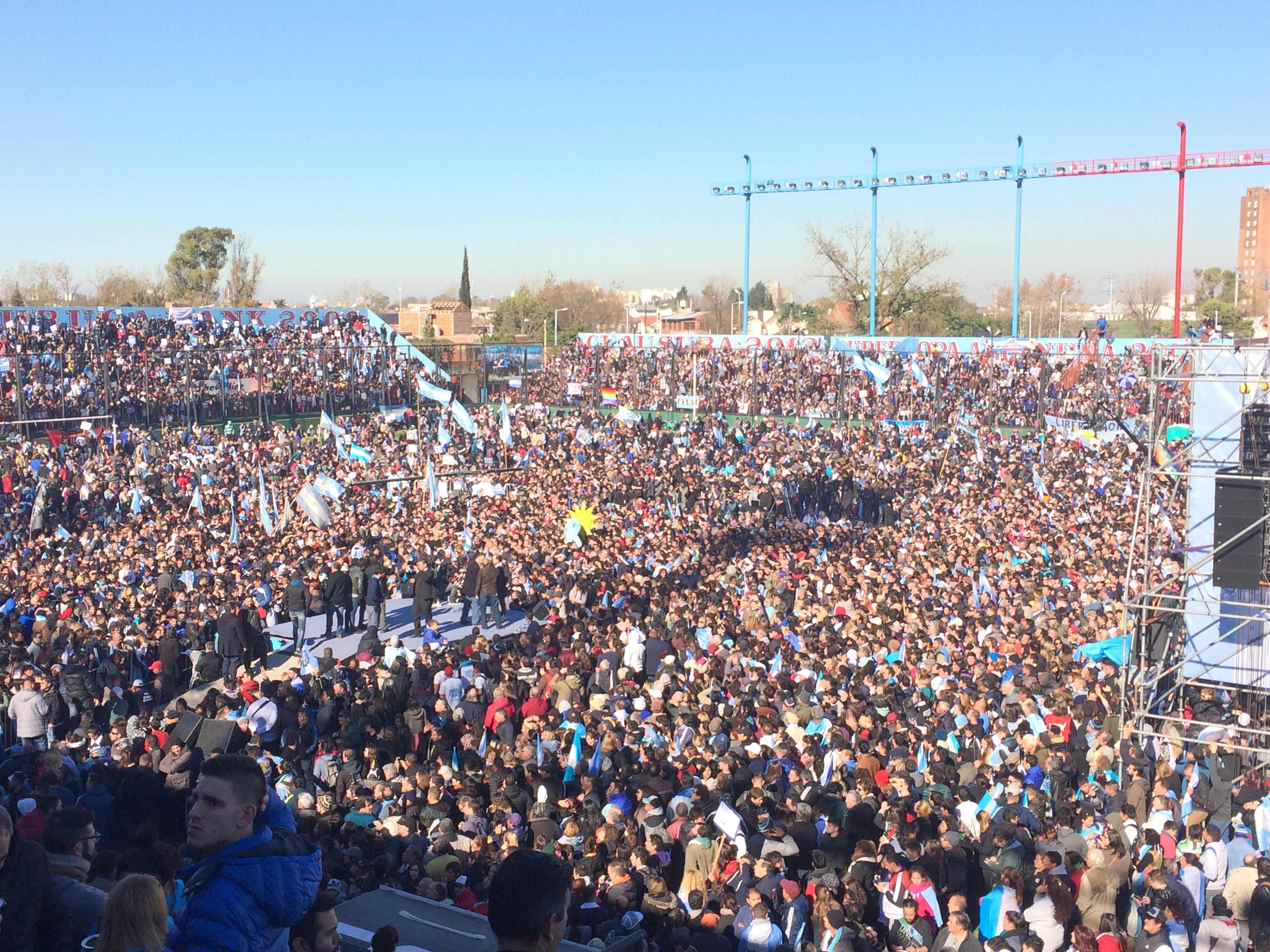 Cristina Kirchner lançando seu partido, a Unidad Ciudadana, en Arsenal.